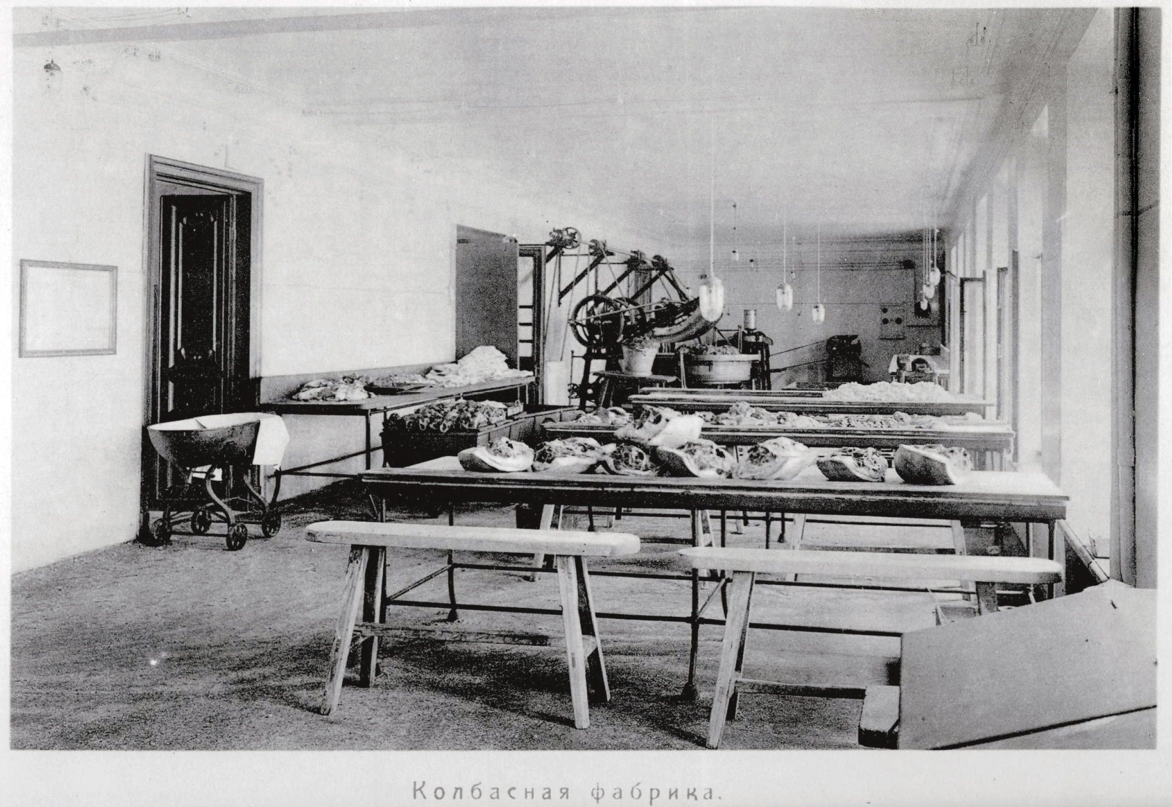 Магазин Елисеева и погреба русских и иностранных вин. Колбасный цех